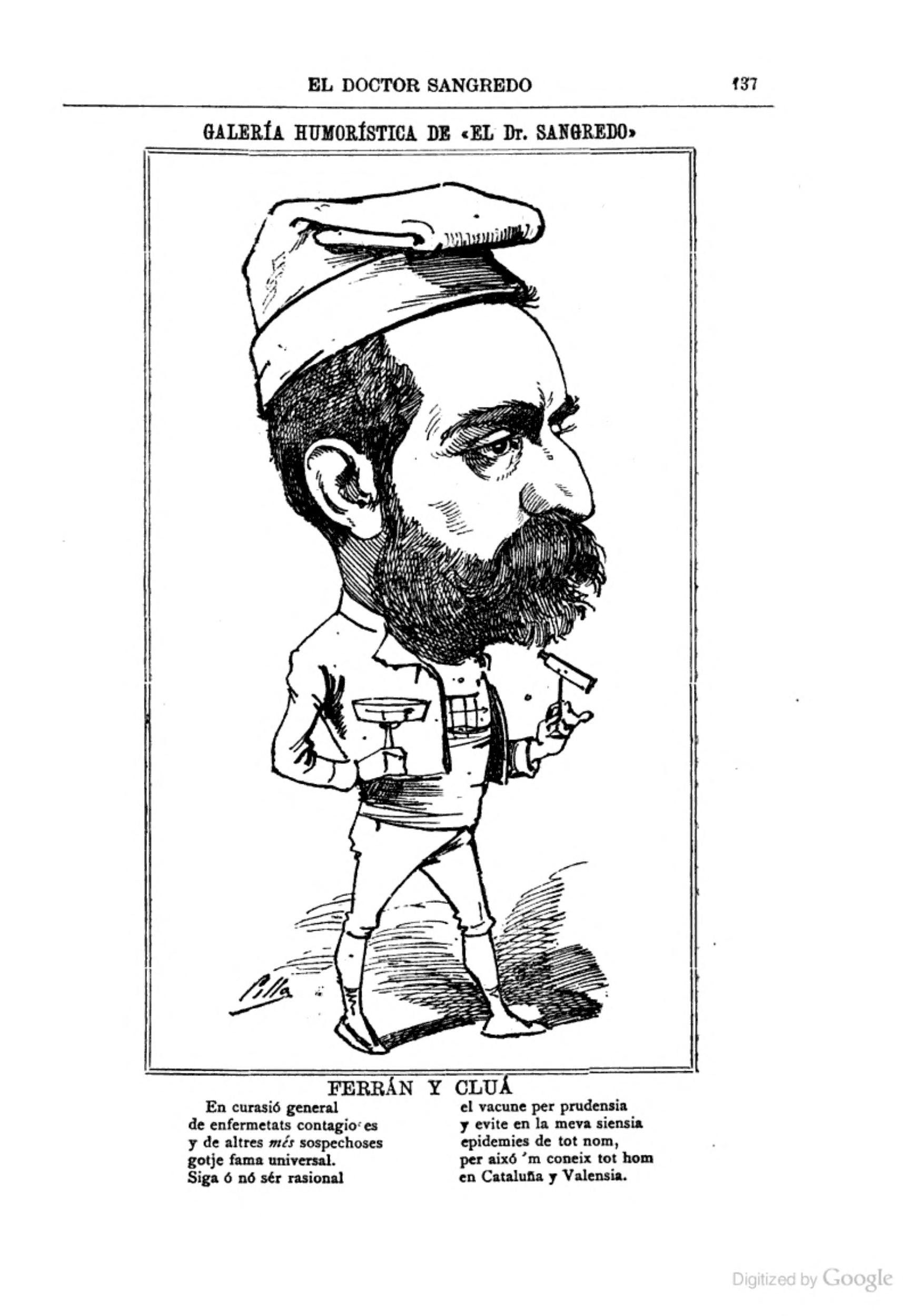 Jaime Ferrán y Cluá.